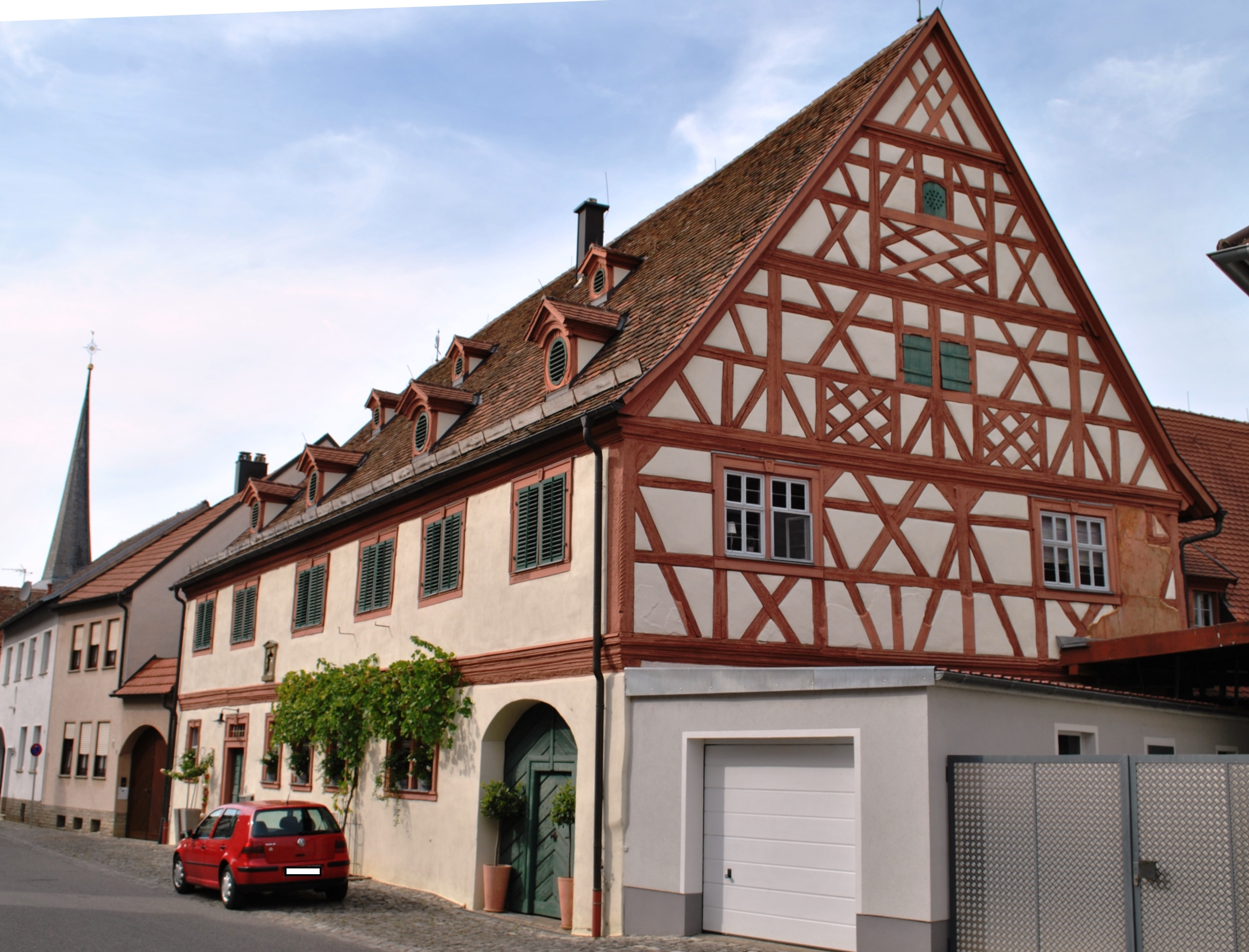 Winzergehöft Zweigeschossiges traufseitiges Satteldachhaus mit Fachwerkobergeschoss, bezeichnet „1629“This is a photograph of an architectural monument.